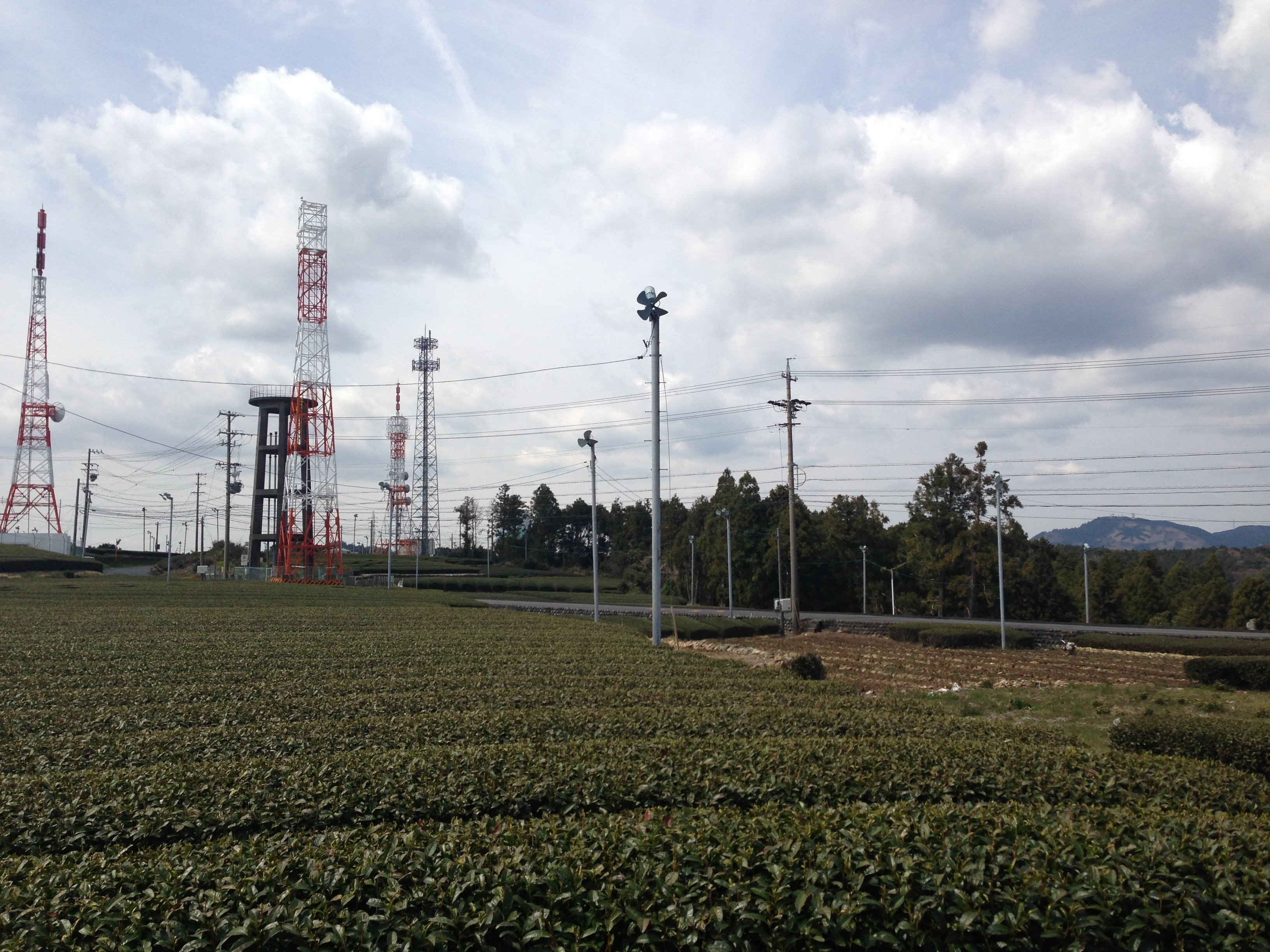 島田中継局の鉄塔群と粟ケ岳